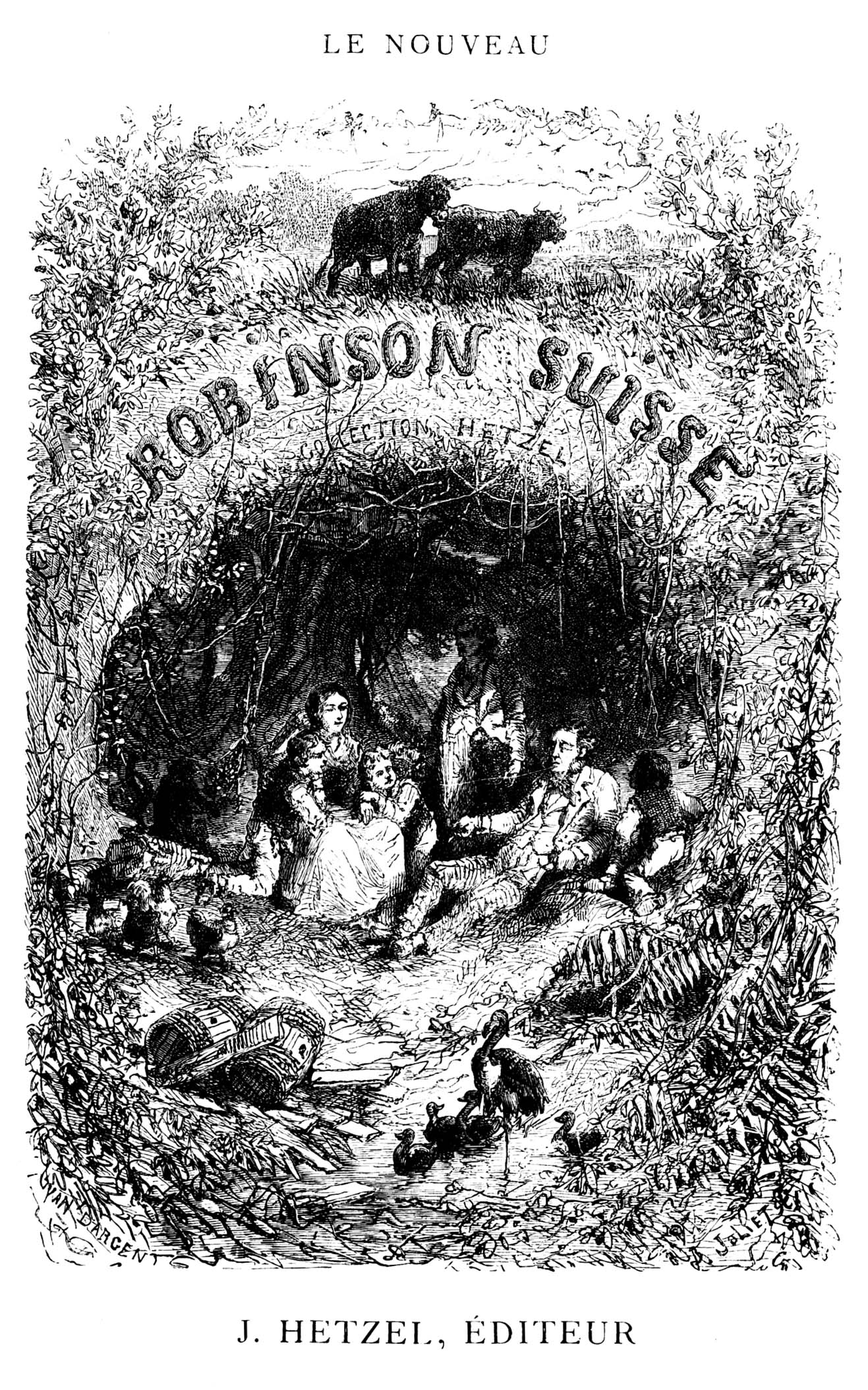 Le nouveau Robinson suisse de Stahl et Muller, frontispice par Yan Dargent, gravé par Joliet.